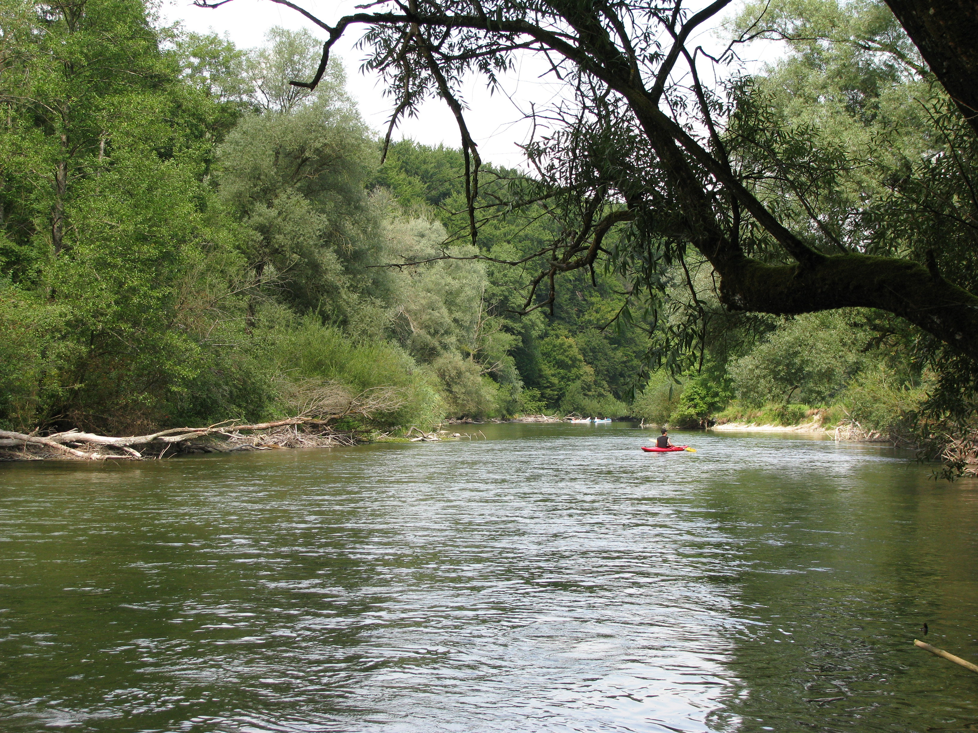 Die Amper zwischen Grafrath und Schöngeising